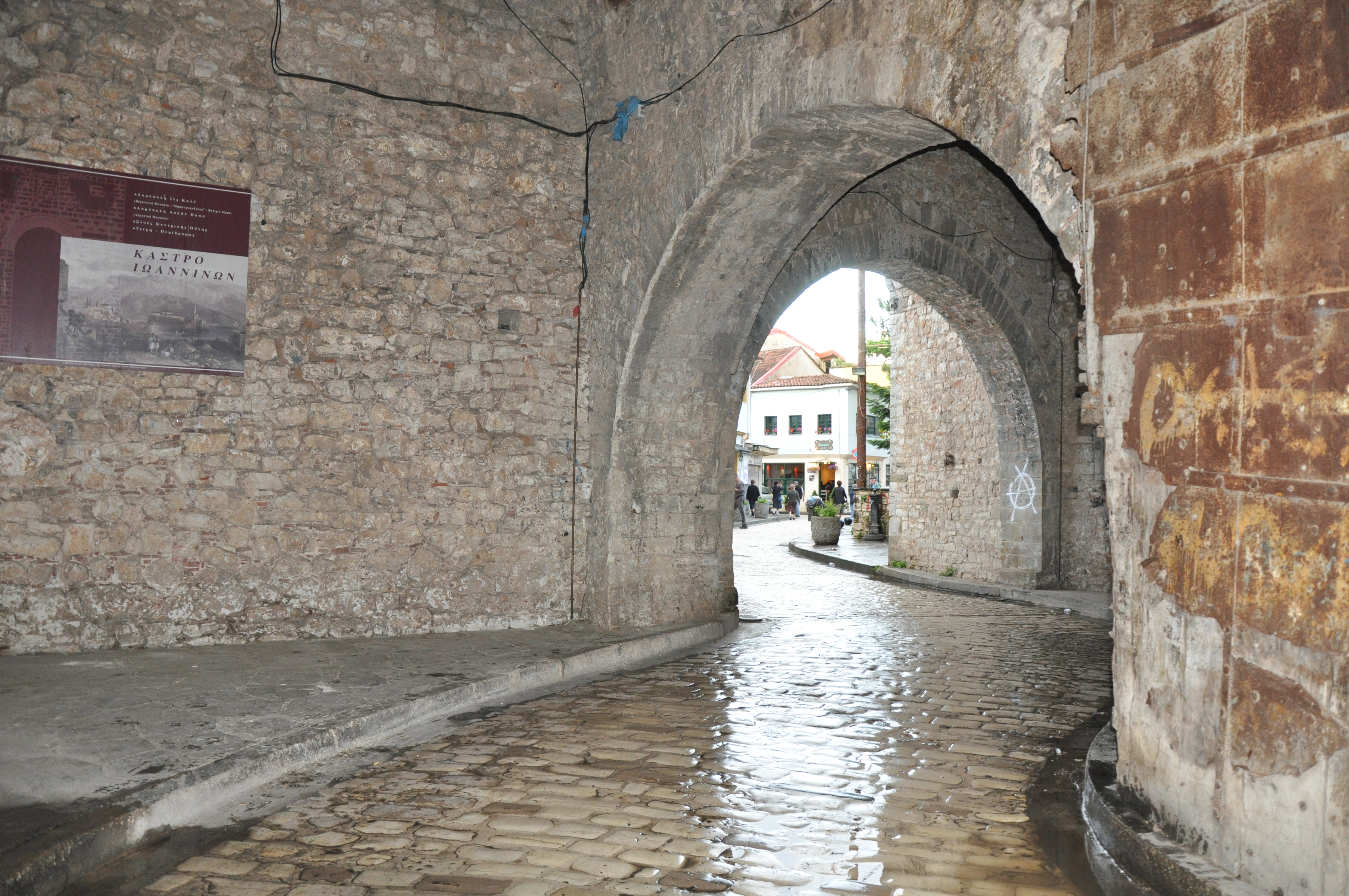 Κάστρο Ιωαννίνων«Κάστρο Ιωαννίνων»